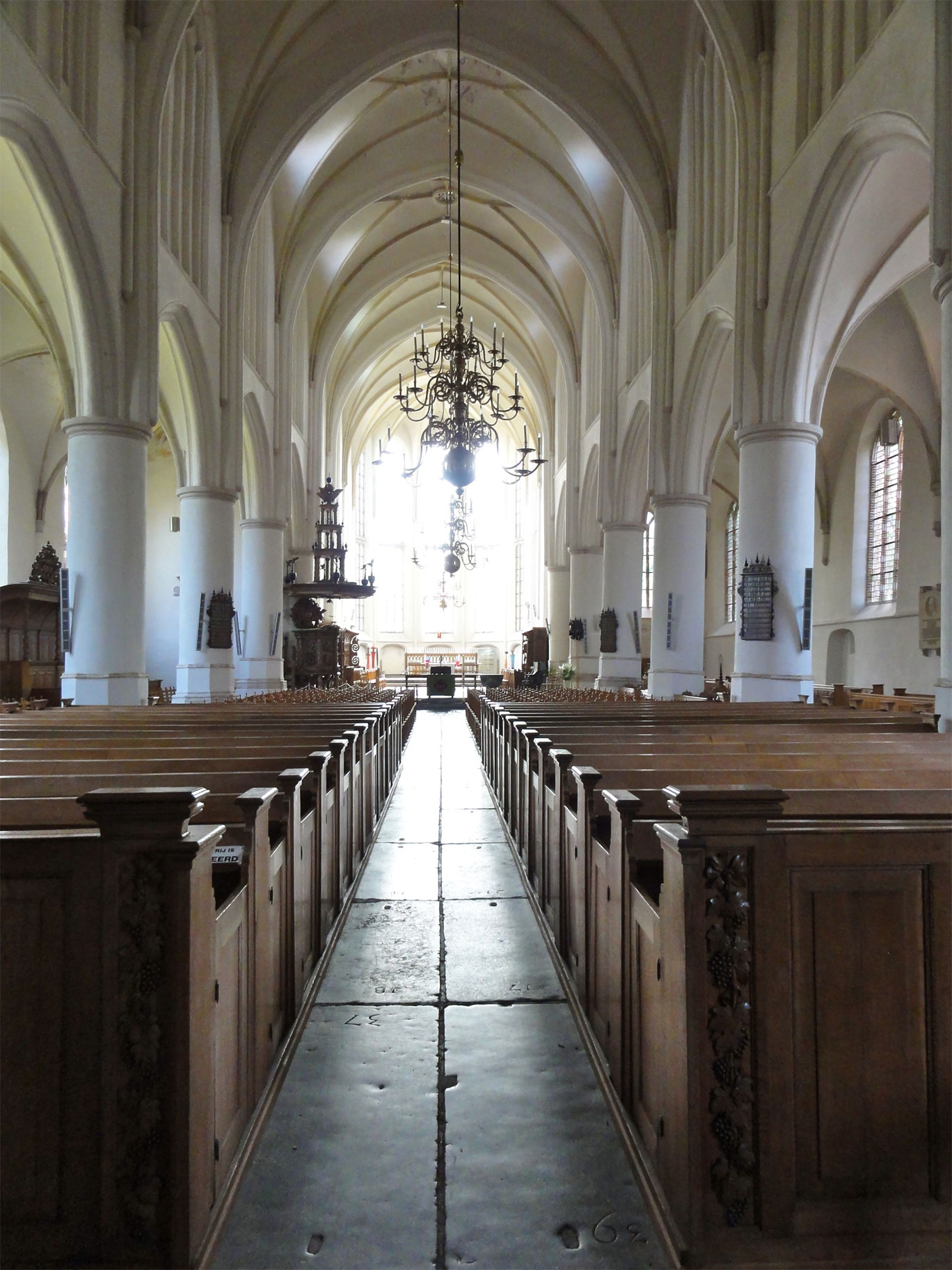 Interieur van de Martinikerk in Bolsward